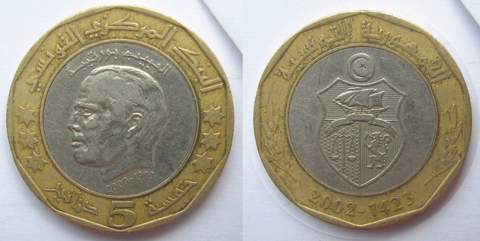 5 tunezyjskich dinarów